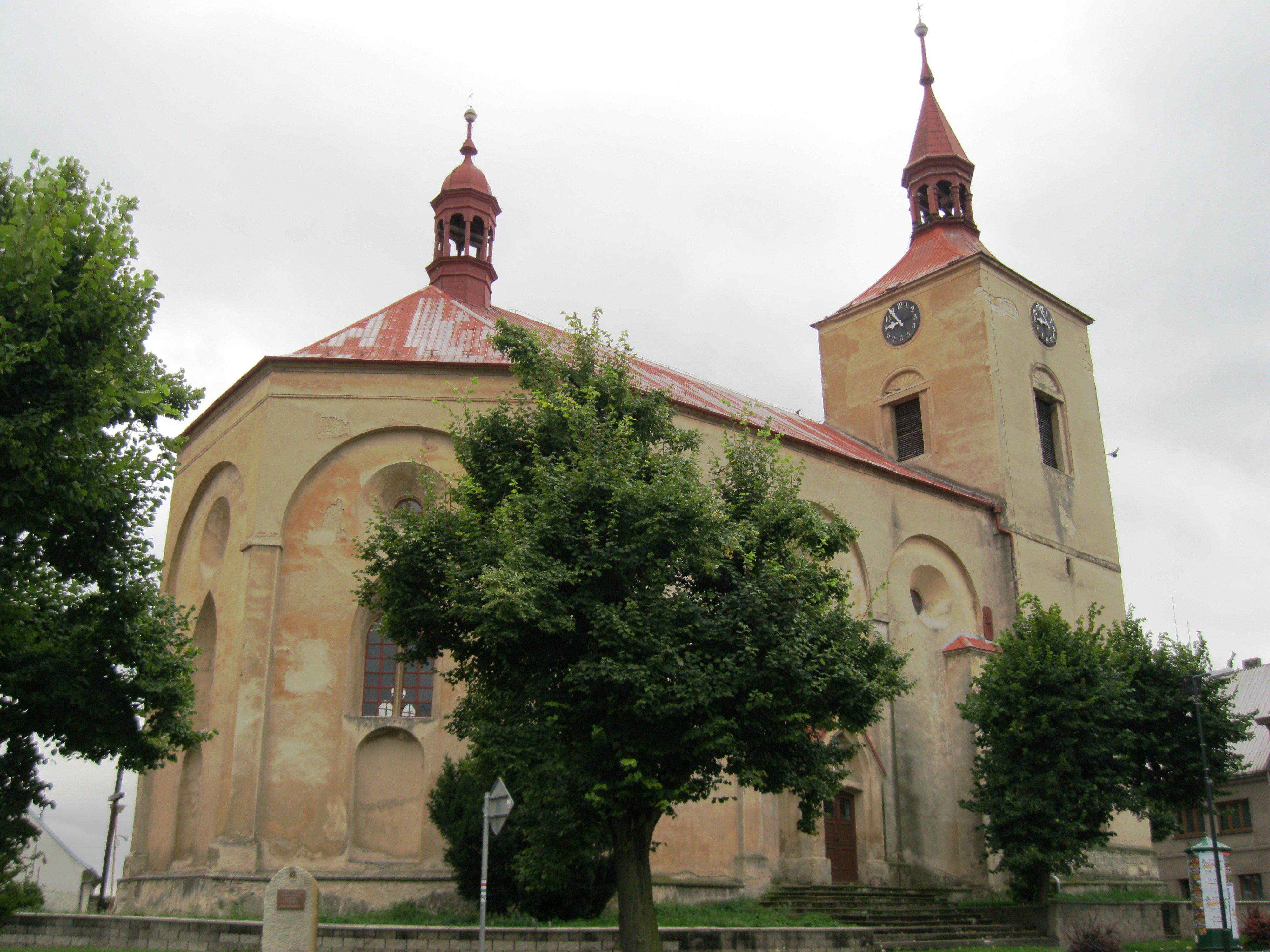 Kostel Narození Panny Marie (Třebenice), Třebenice